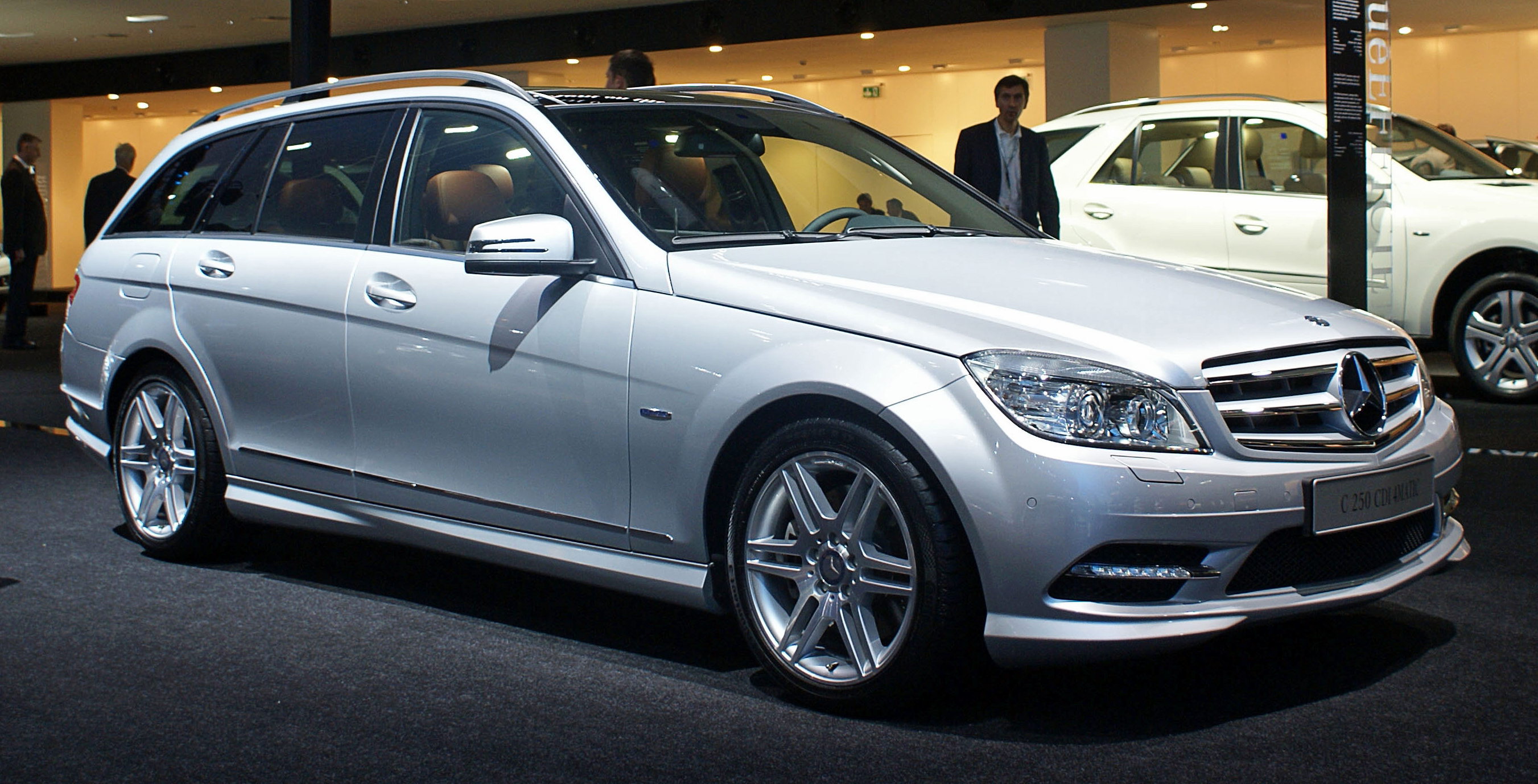 Mercedes-Benz C 250 CDI T 4MATIC